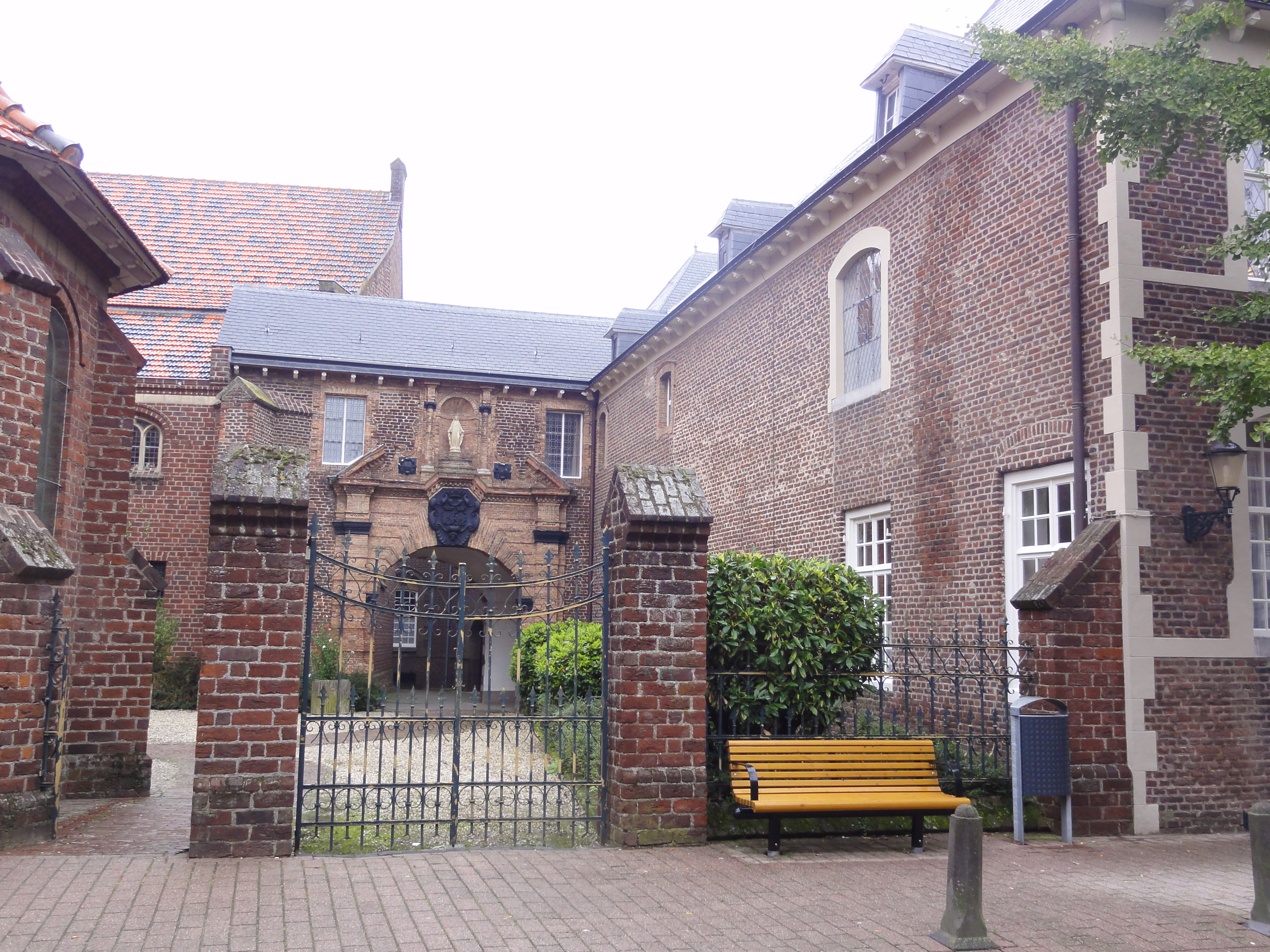 Boxmeer Rijksmonument 10031 Carmelietenklooster Steenstraat 39, hek en poort erachter 11″ N, 5° 57′ 09.69″ E